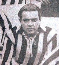 Jogador de futebol do Santos F C até 1922.